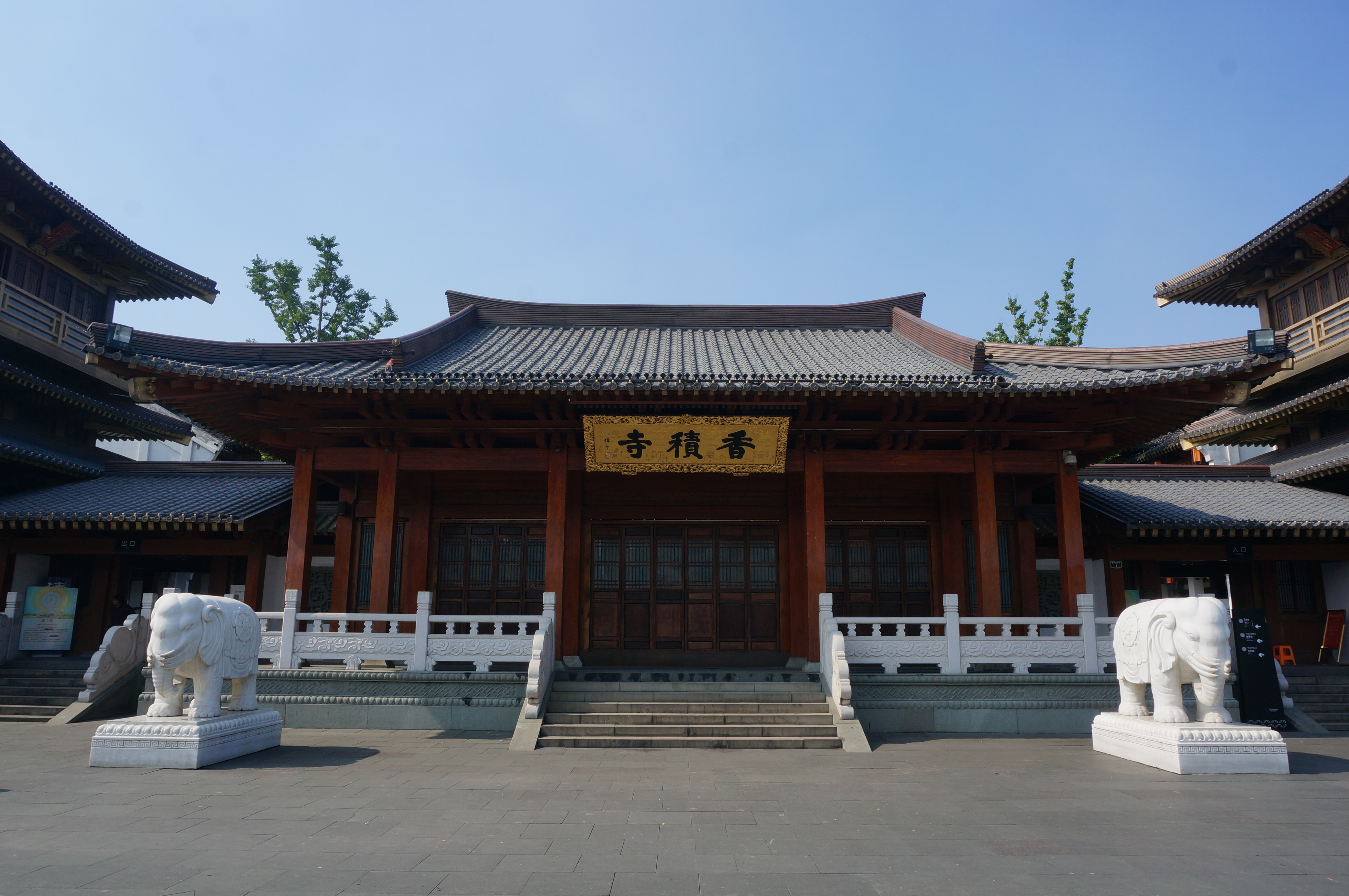 杭州香积寺，天王殿南侧。